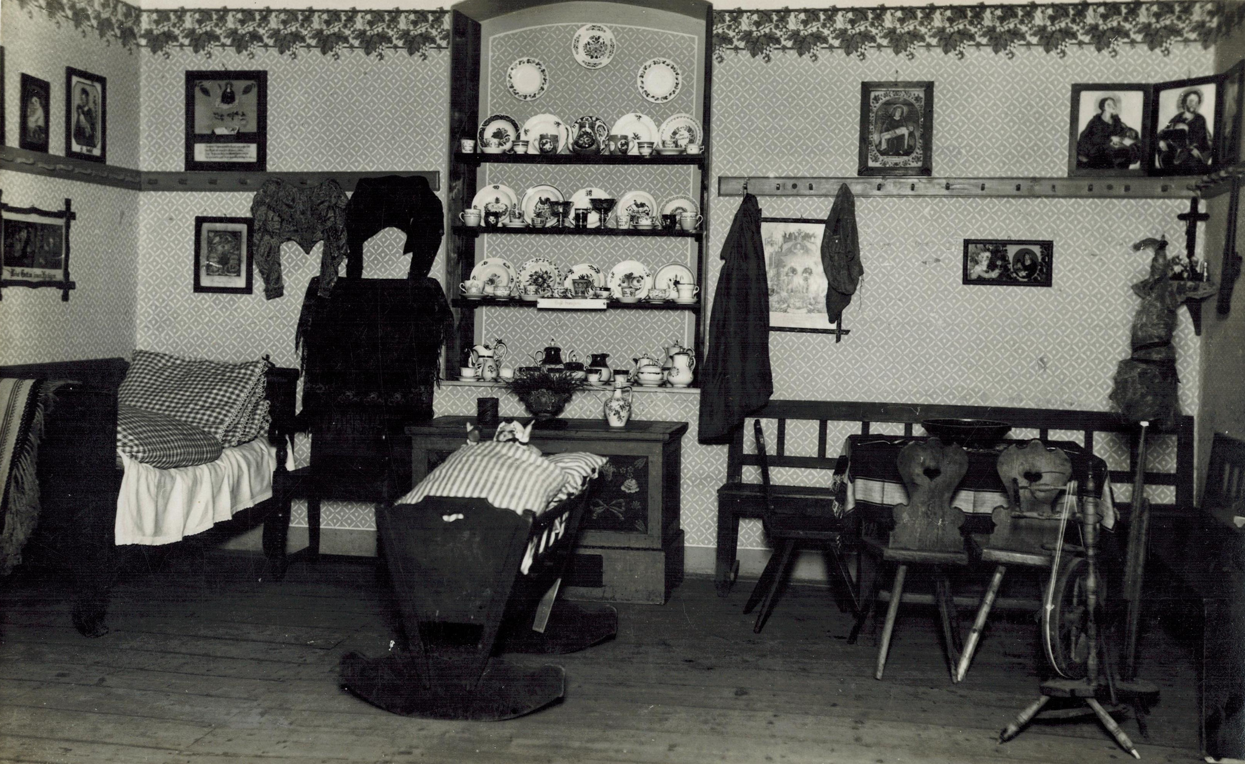 Exposition of Etnography in Jeseník (the 30s)